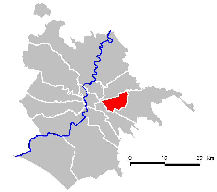 Municipio Roma V